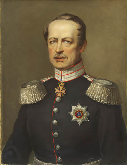 Halbfigur nahezu en face in Uniform